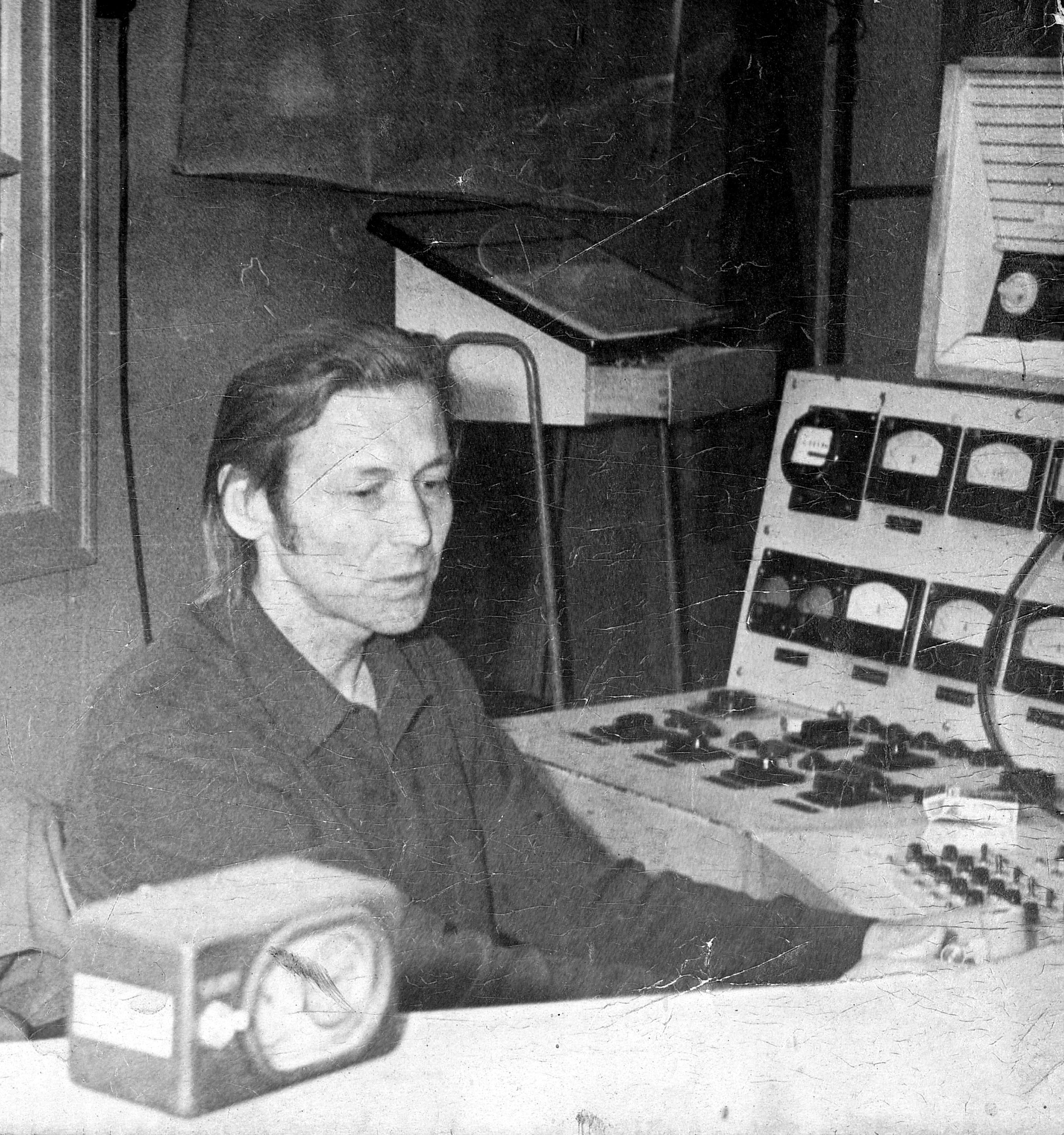 в ЛЯР